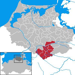 Former Amt Trebeltal in Mecklenburg-Vorpommern - District Nordvorpommern